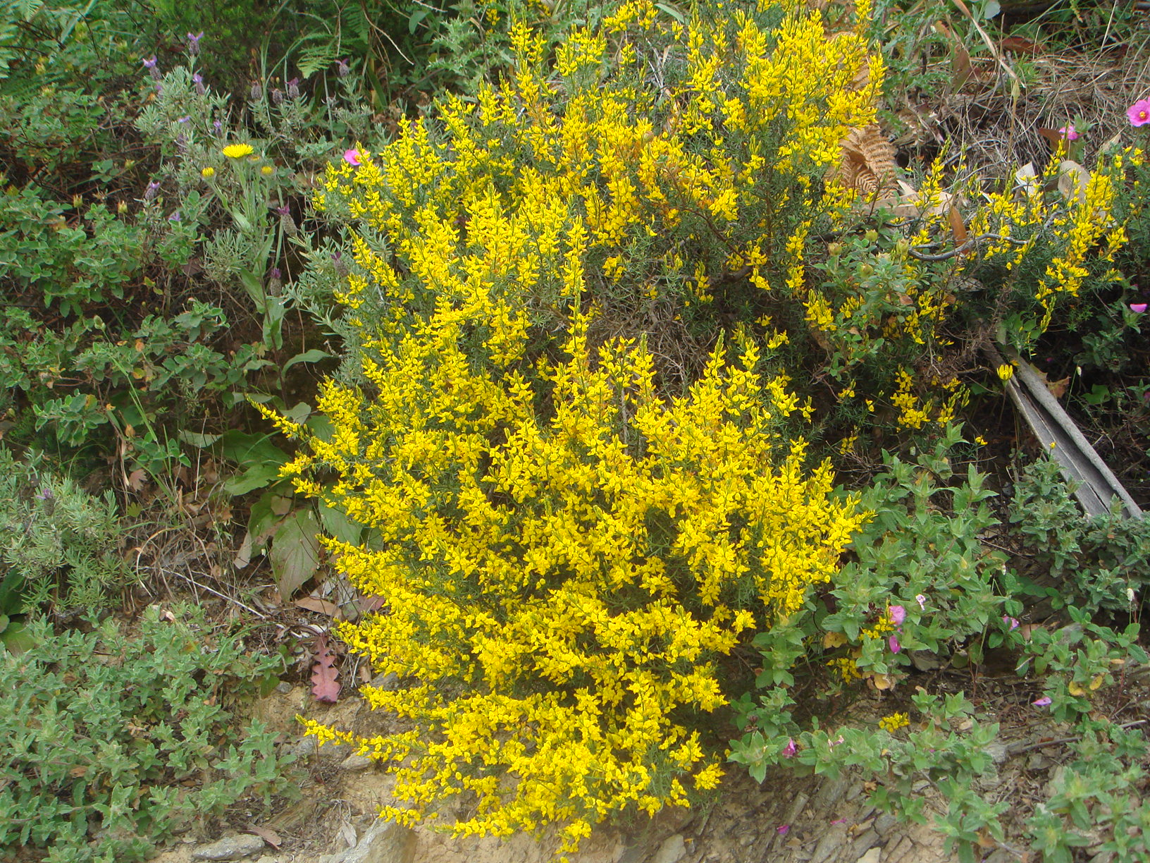 Aulaga (Genista tridens), Ceuta, España.